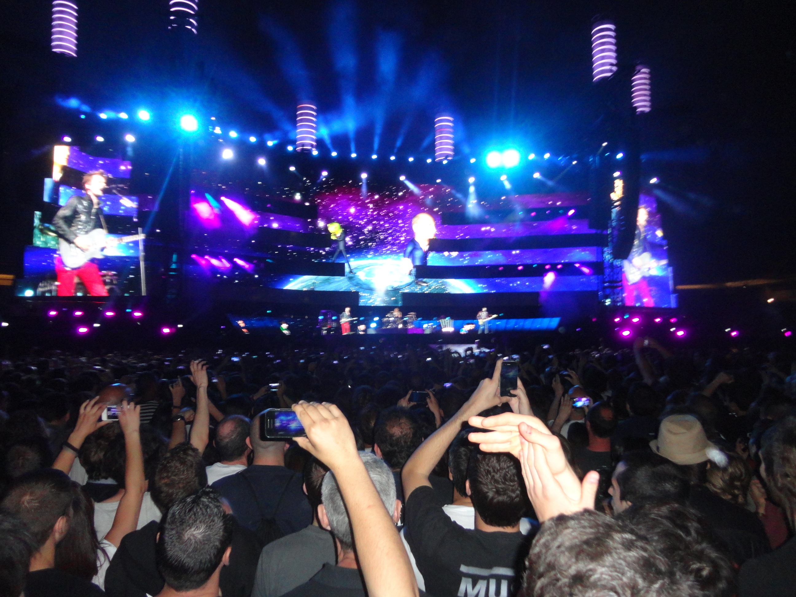 Moment del concert